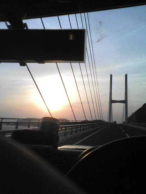 Sunrize to Megami big bridge, in Nagasaki, Japan 長崎市女神大橋の夕日